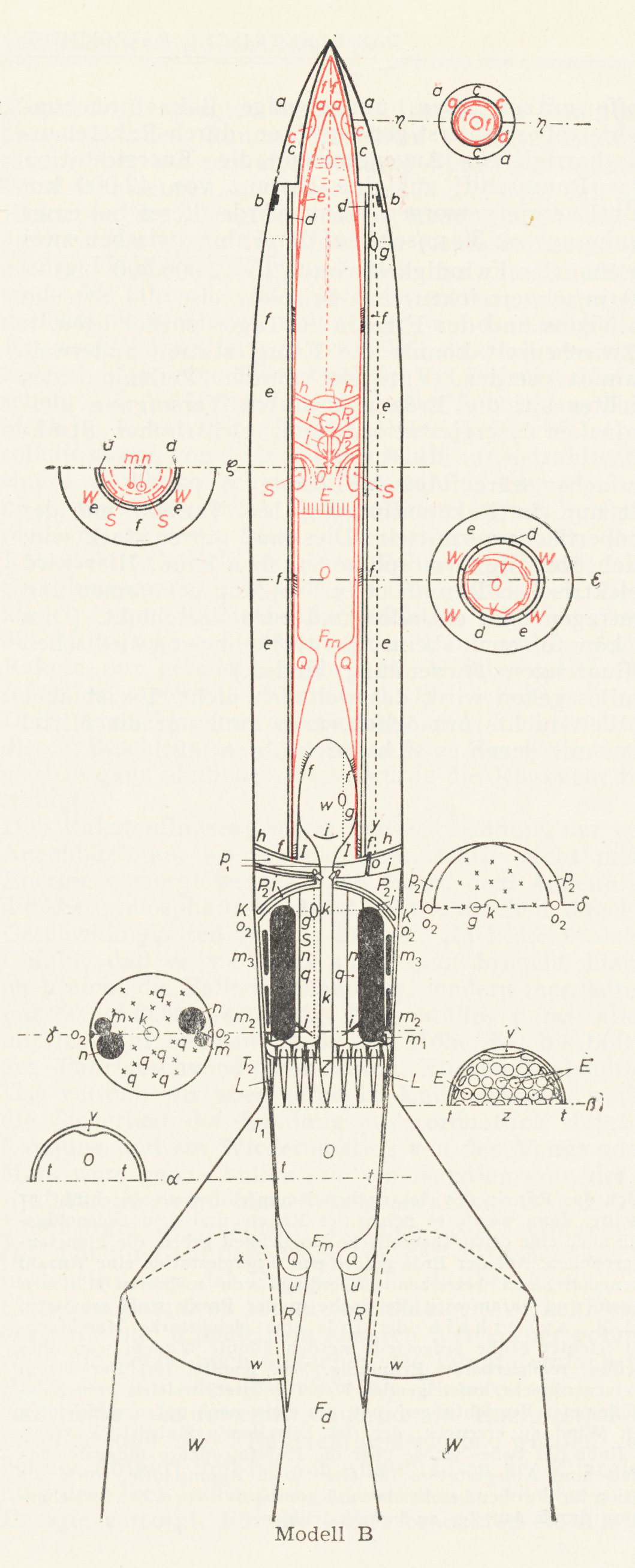 H. Oberths zwei-stufige Rakete (Modell B), entworfen fuer Lehrzwecke.